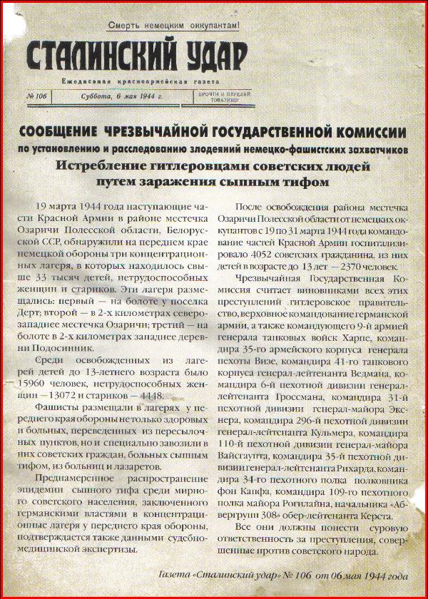 Газета "Сталинский удар" (от 6 мая 1944 года)